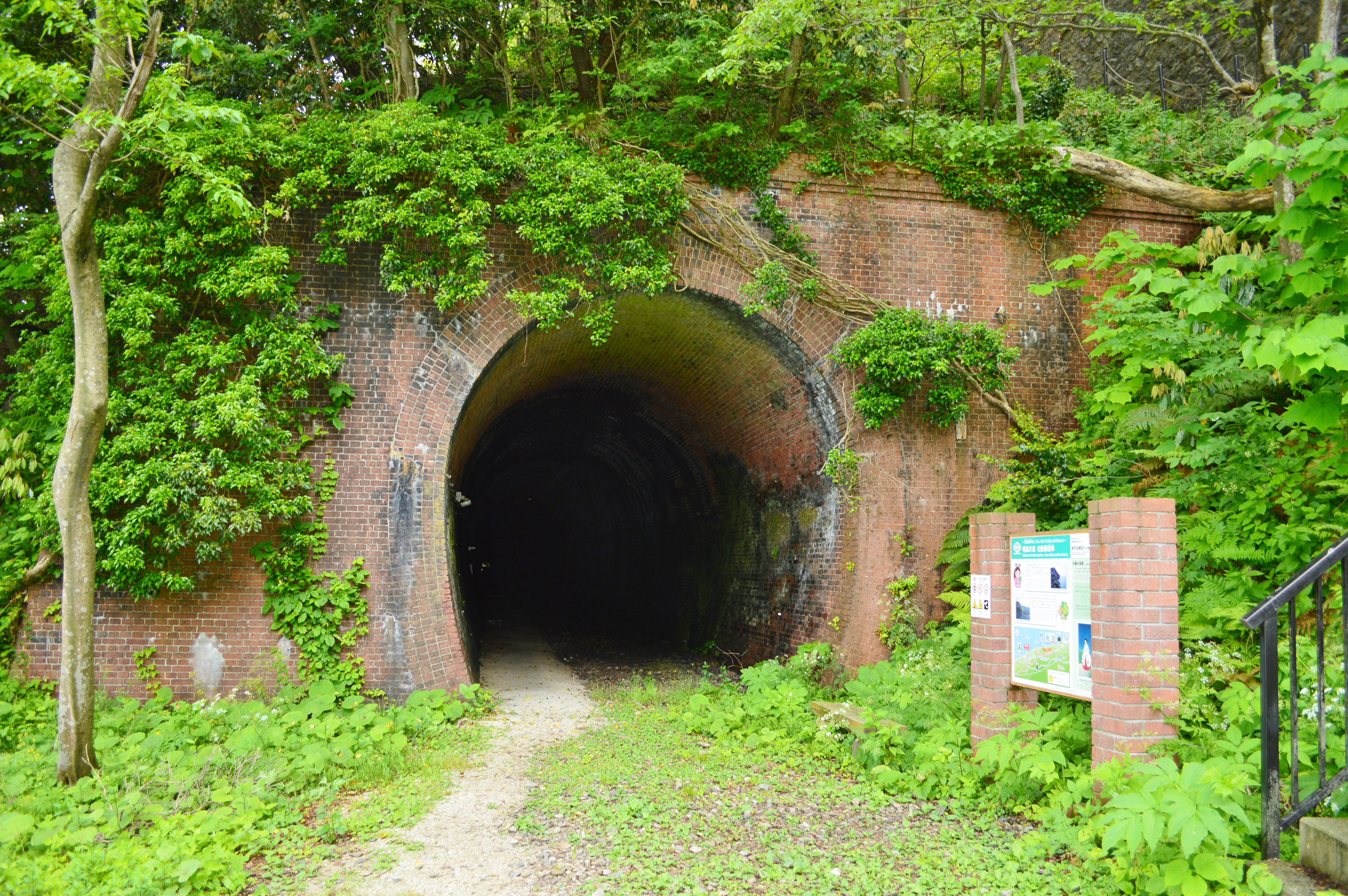 旧北陸本線親不知トンネル 西開口部 Nikon D3200